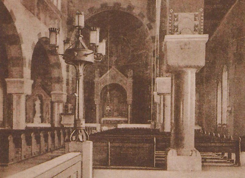 Interieur der Liebfrauenkirche in Leipzig-Lindenau um 1920